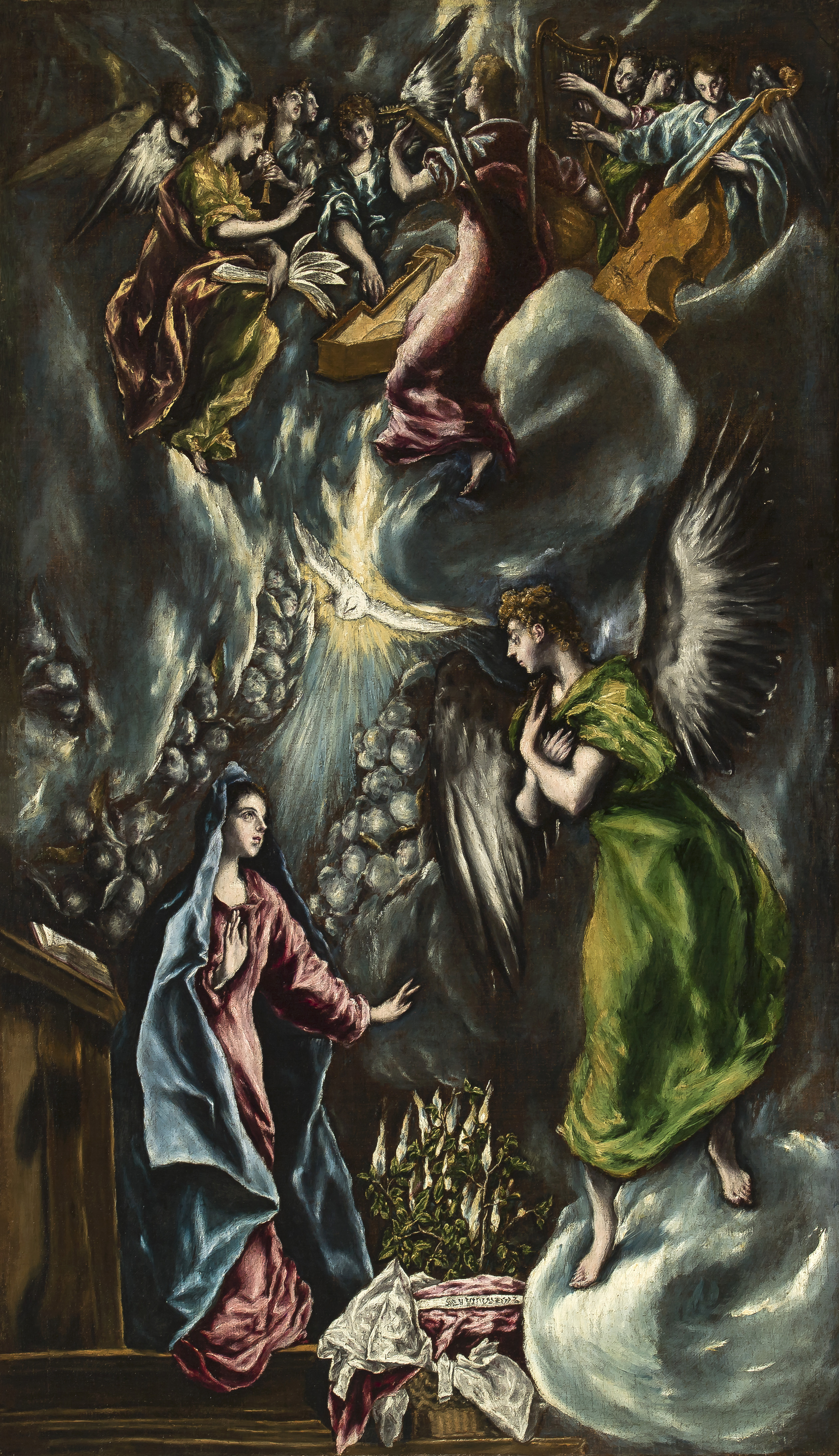 El lienzo representa el momento en que el arcángel San Gabriel anunció a la Virgen María que sería la madre del Salvador, Jesucristo. Esta obra es una replica, aunque de menores dimensiones, de la Anunciación pintada por El Greco que se conserva en el Museo del Prado y que casi con toda seguridad formó parte del retablo de doña María de Aragón.